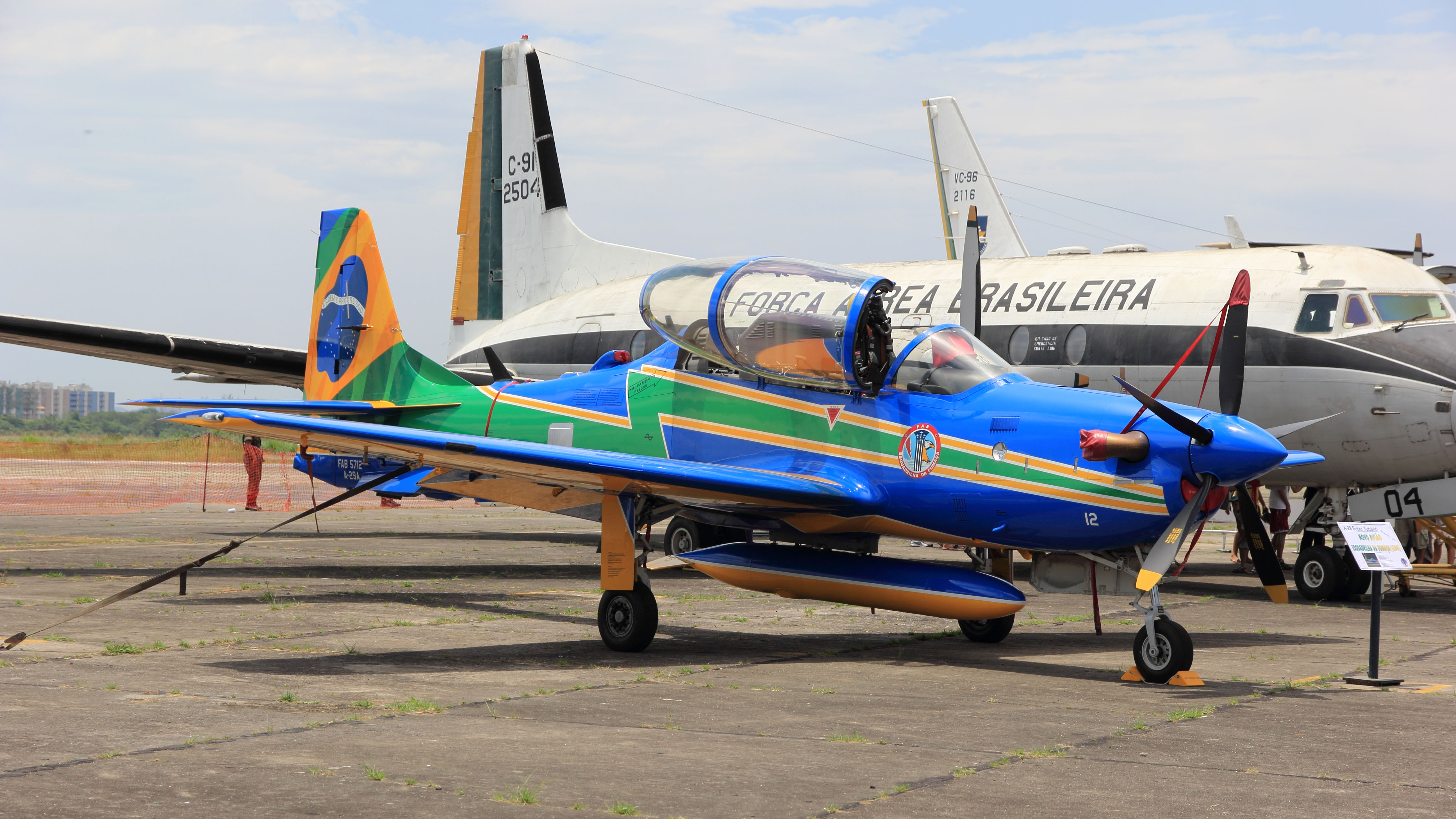 A-29 Super Tucano - Novo avião da Esquadrilha da Fumaça (EDA)